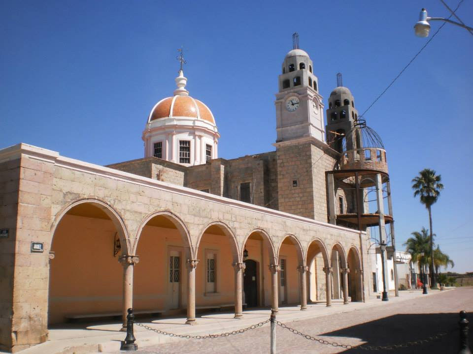 Templo en honor a San Isidro Labrador, ubicado en Mirandillas, Jal.